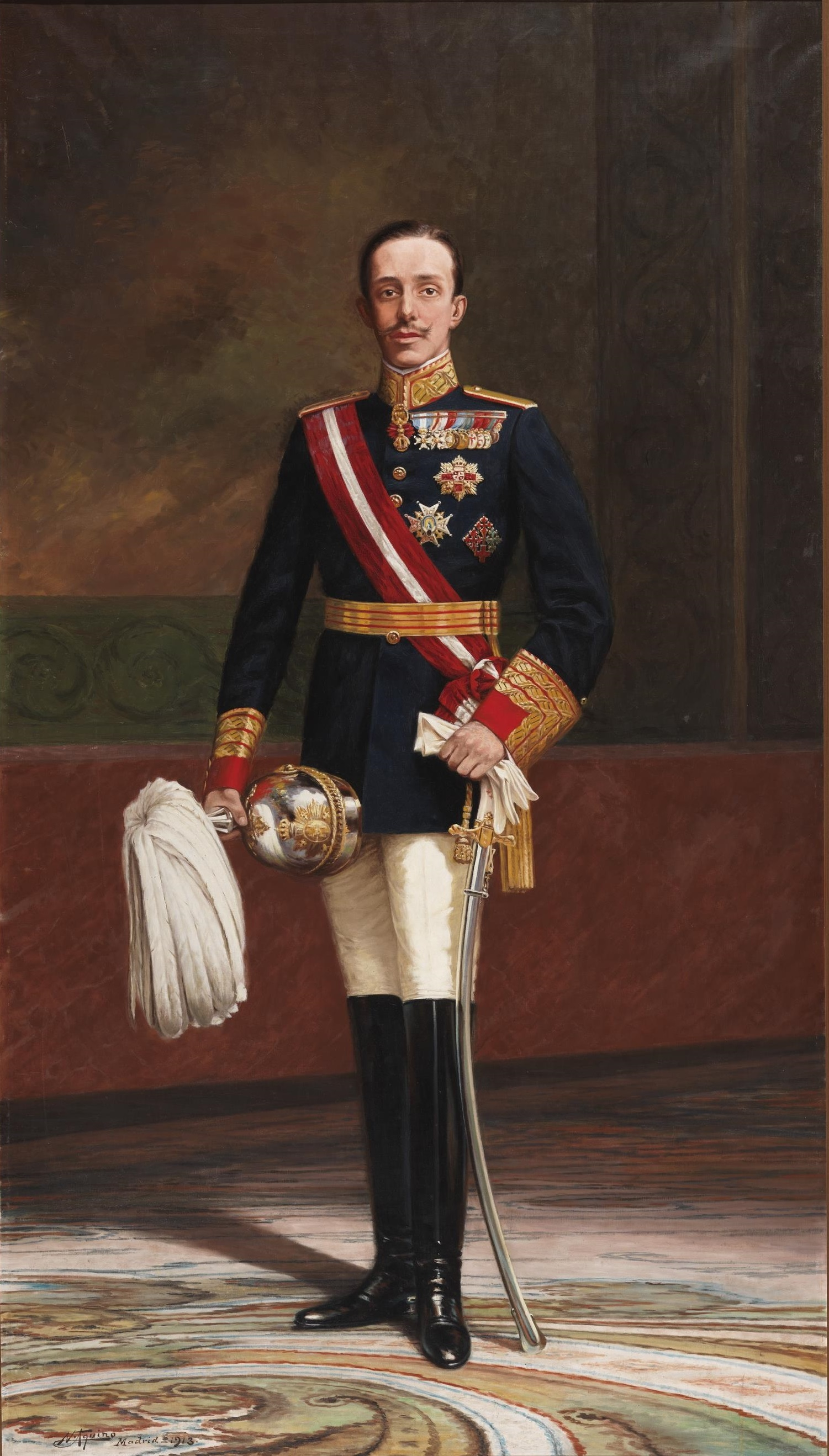 Retrato del rey Alfonso XIII de España (1886-1941), vestido con el uniforme de capitán general del ejército español y luciendo numerosas condecoraciones, como la venera de la Orden del Toisón de Oro y la gran cruz de la Orden de Carlos III.